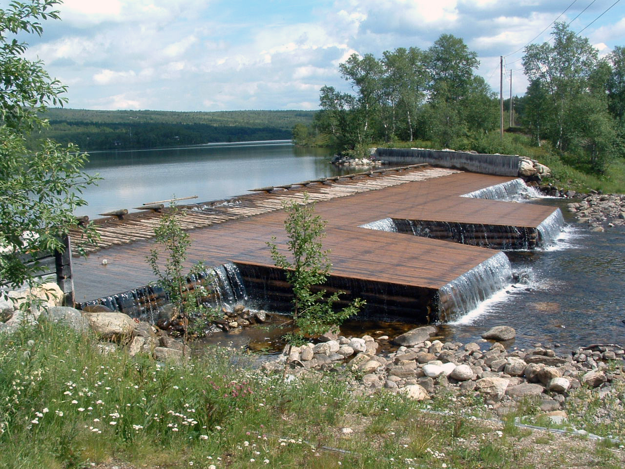 Djupsjødammen, Røros. Tømmerkistedam ved Djupsjøen i Hitterelva, bygd for å forsyne Røros Kobberverk med jevn vanntilførsel. Inngår i Verdensarvstedet Røros. Dam restaurert i 1993.